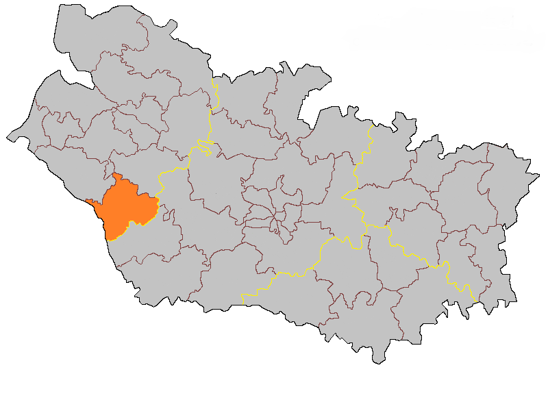 Кантон Уазмон на карте департамента Сомма